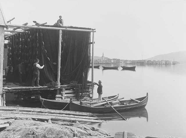 Namsos ca. 1880, fotograf Axel Lindahl (1841-1906), bildet er hentet fra Nasjonalbibliotekets billedsamling.